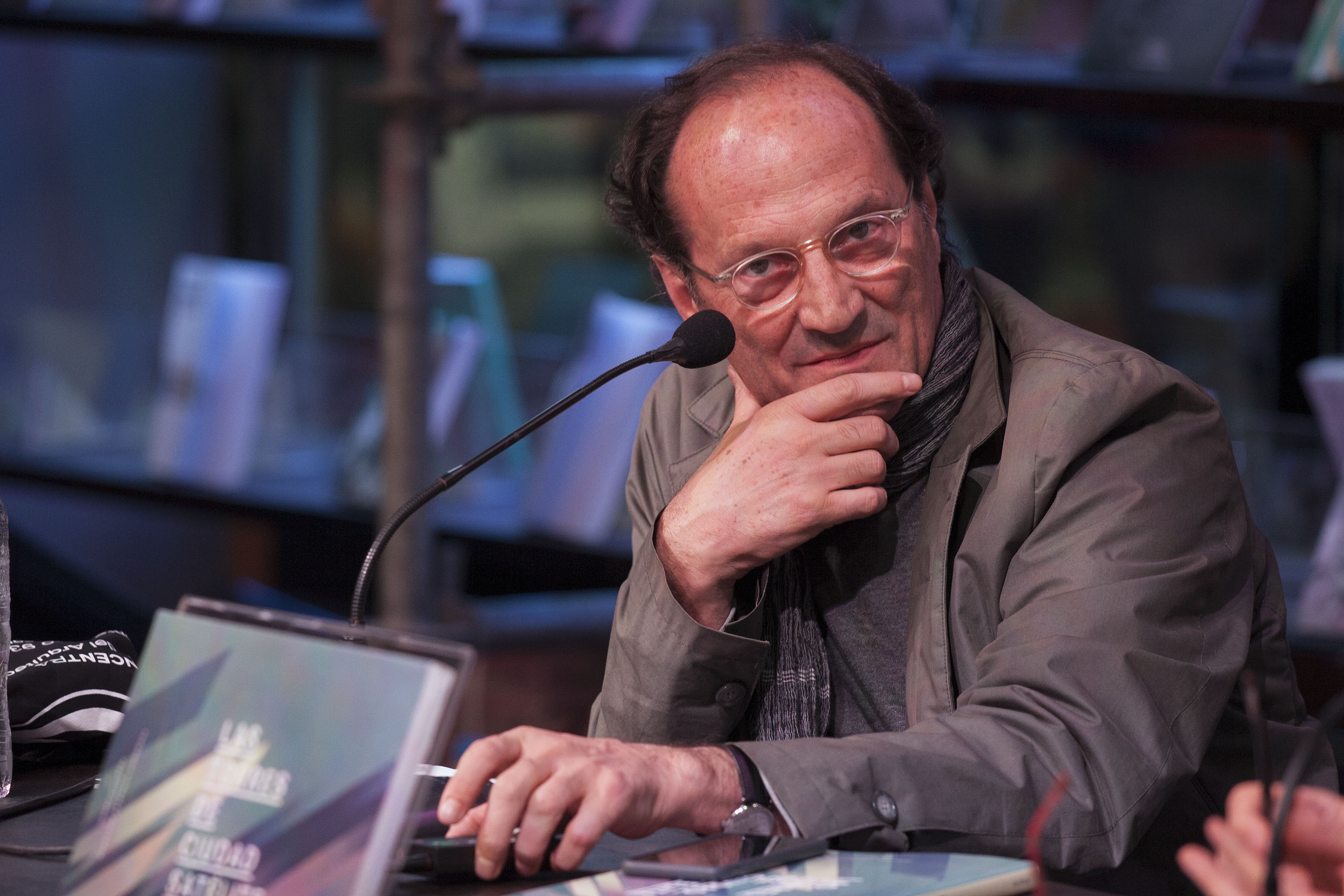 Sábado, 2 de Mayo 2015. En el marco de la 41a Feria Internacional del Libro de Buenos Aires se realizó la presentación del libro Torres de Satélite, editado por Arquine, con Miquel Adrià y Gabriela López, en el Stand de la Ciudad de México. Foto: Antonio Nava / Secretaria de Cultura Ciudad de Mexico.